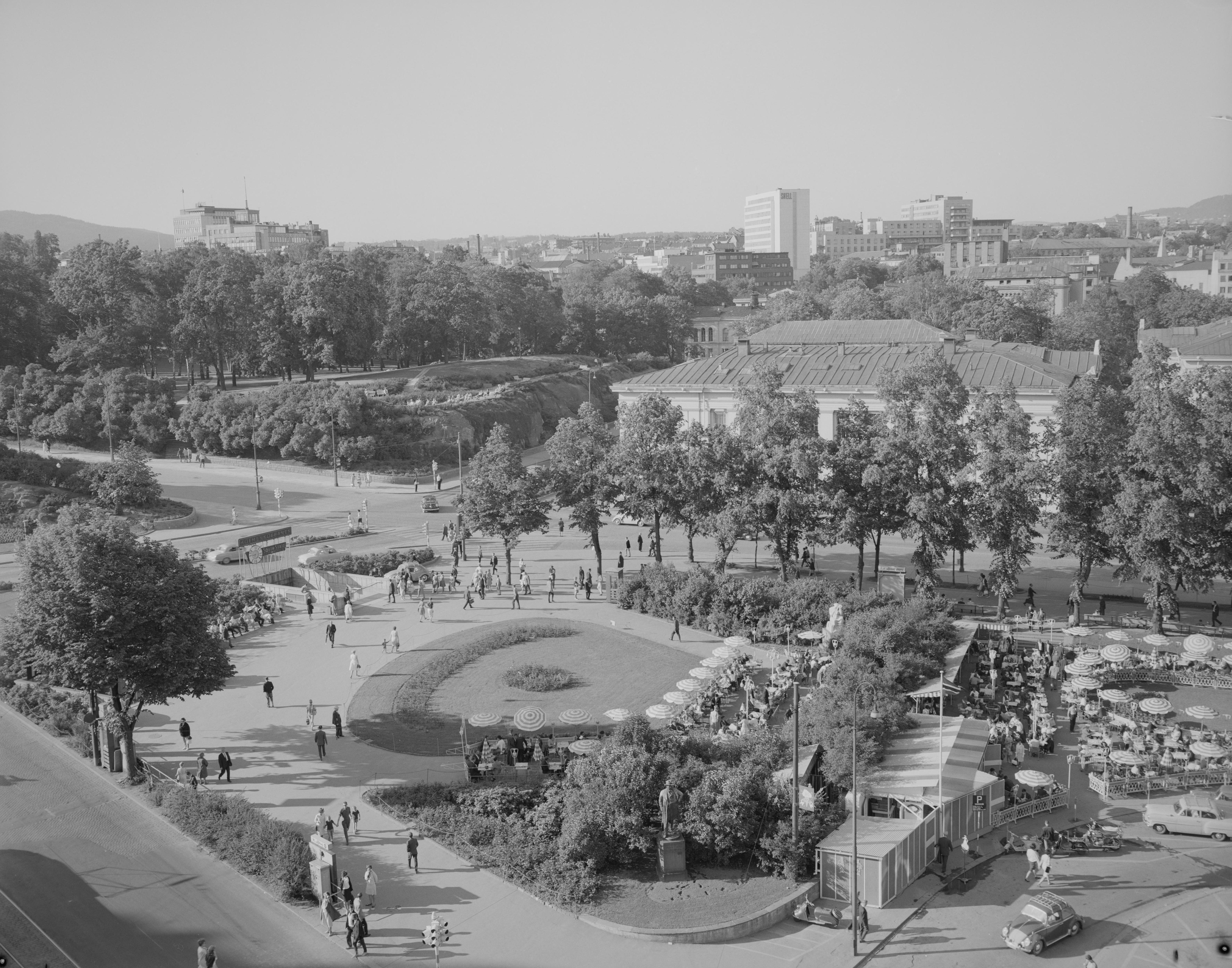 Bildet er hentet fra Nasjonalbibliotekets bildesamling. Anmerkninger til bildet var: fotograf: A.H. Oslo, Oslo, Oslo